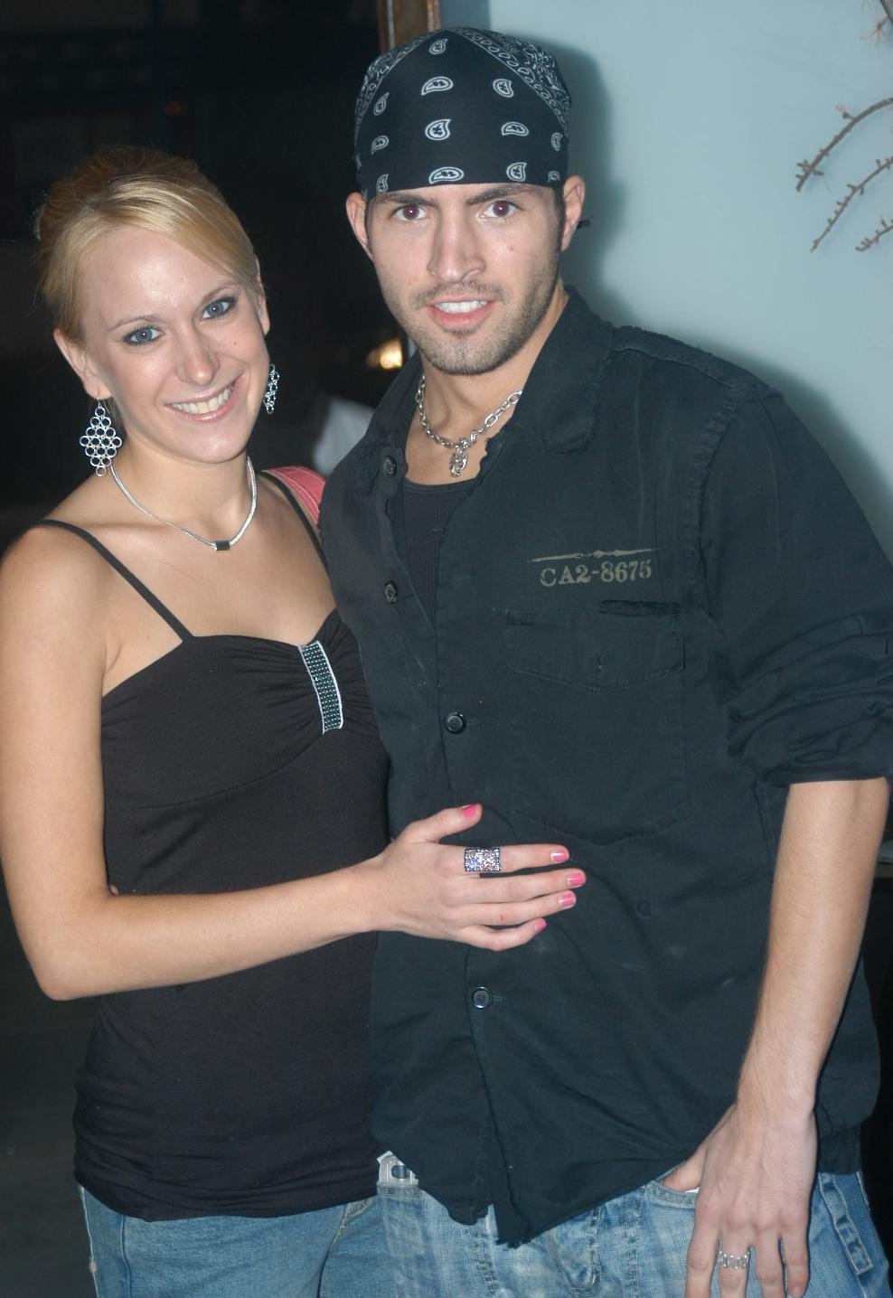 Erin Moore, Kris Slater at Deep Throat Hi-Def Premiere.